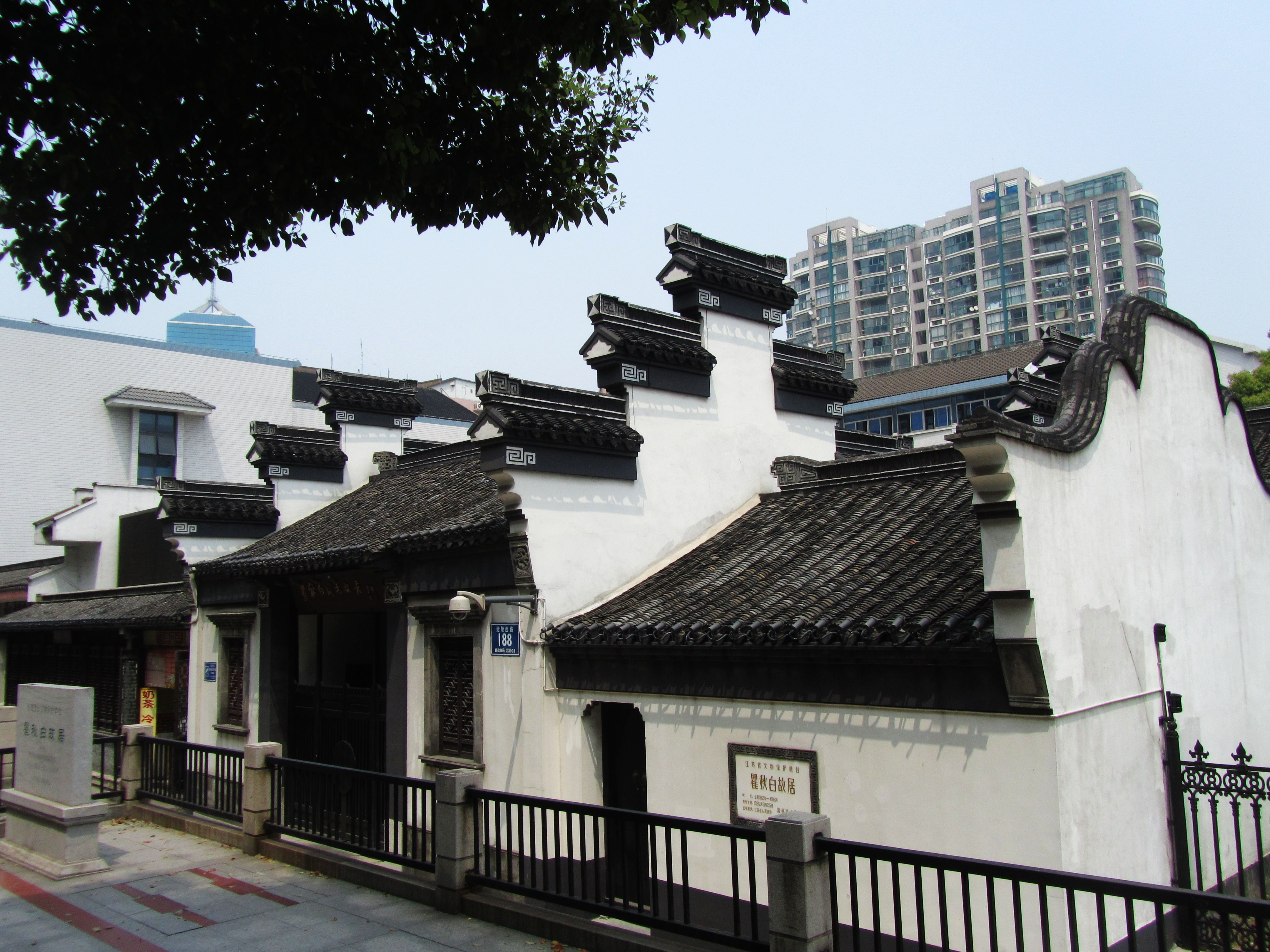 常州延陵西路188号瞿氏宗祠，瞿秋白故居。